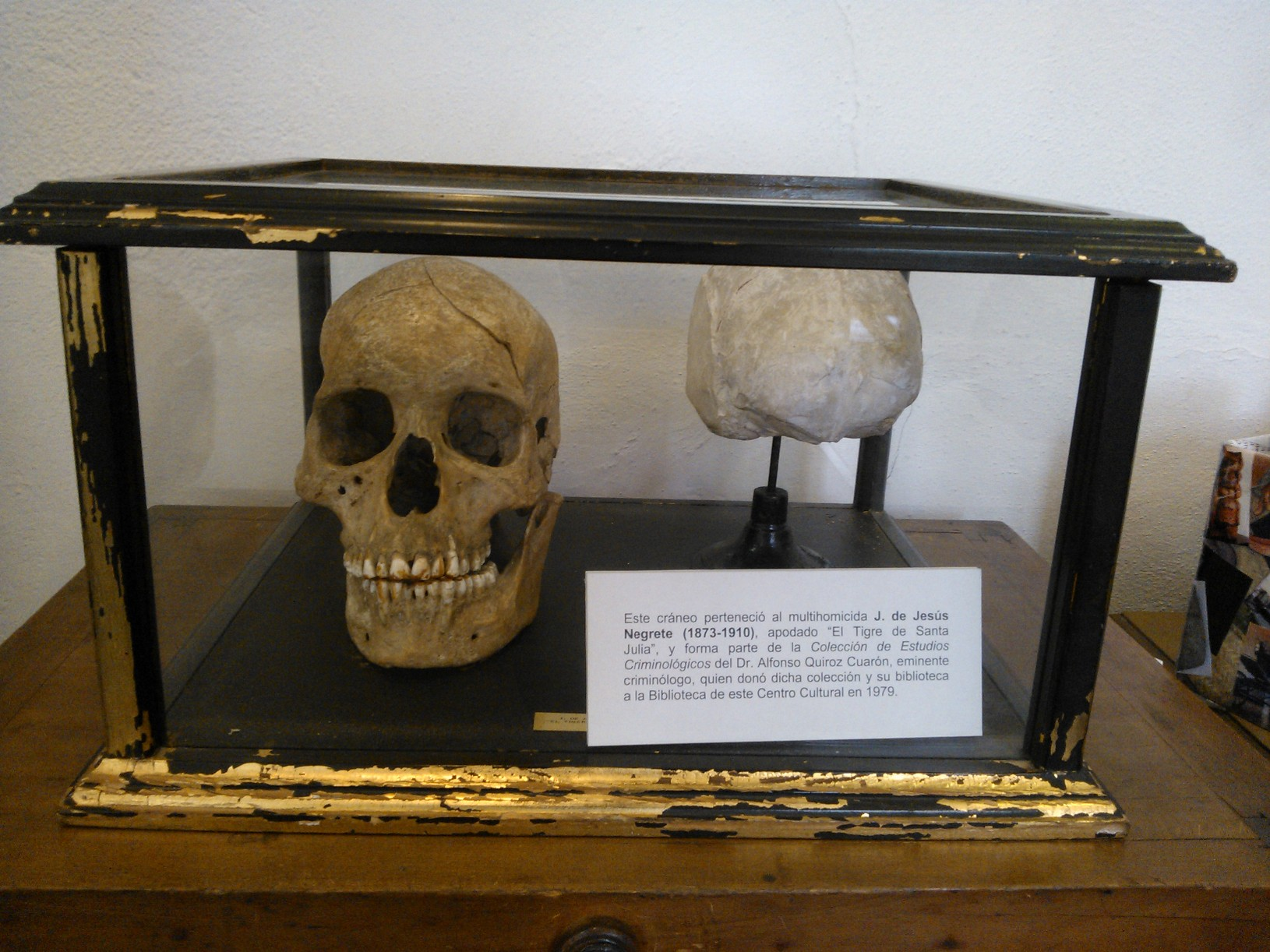 Craneo del multihomicida José de Jesús Negrete Medina conocido como el tigre de Santa Julia en el centro cultural Isidro Fabela, Ciudad de México